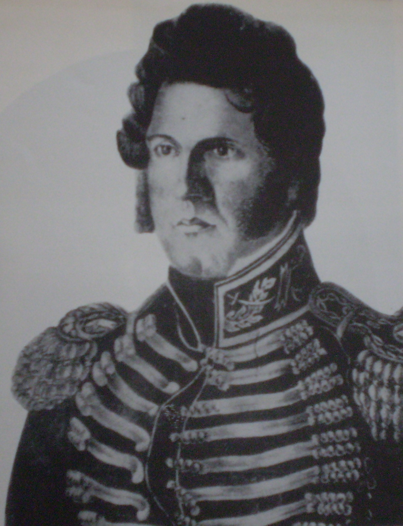 Pascual Echagüe (1797-1867), Litografía de Andrea Bacle.